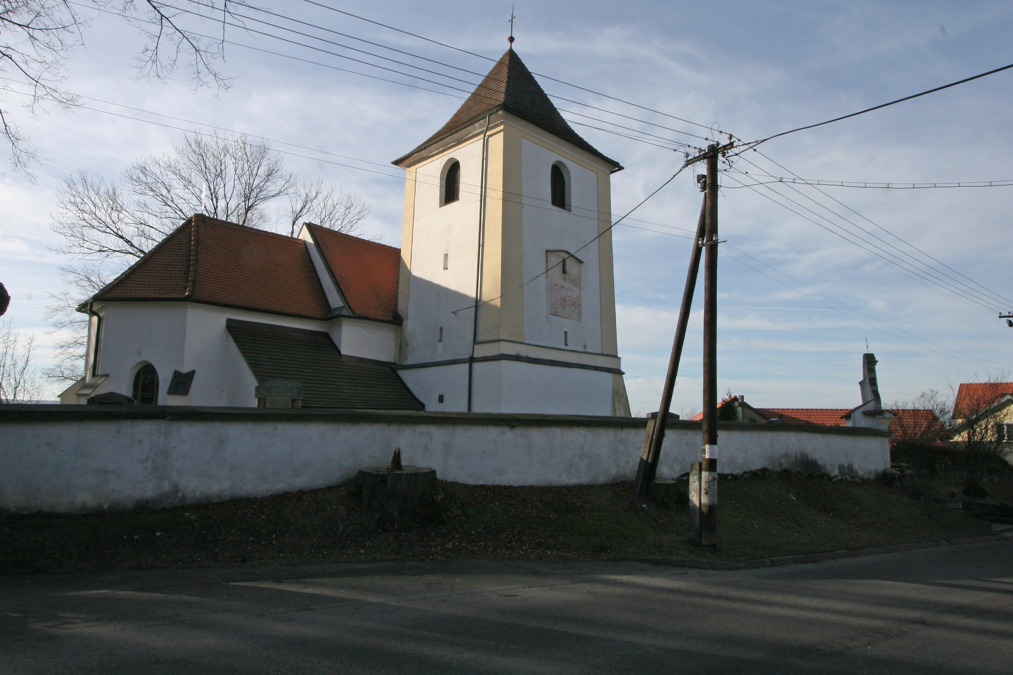 Kostel sv. Jana Křtitele (Perálec), Perálec